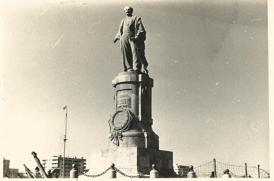 פסל דה לספס בכניסה לתעלת סואץ